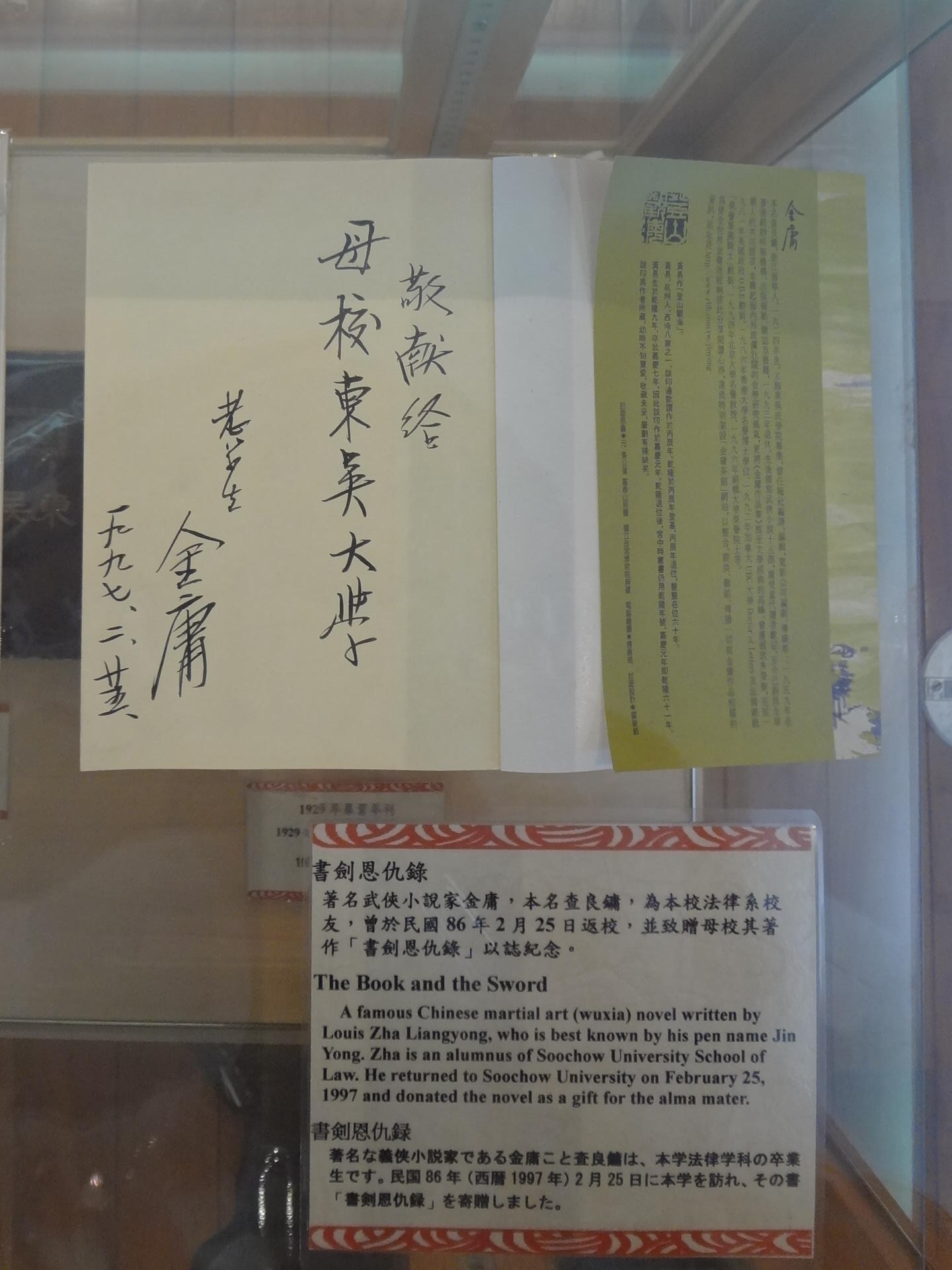 中文（台灣）: 1997年2月25日，金庸送給東吳大學的《書劍恩仇錄》簽名書。展示於東吳大學校史室。